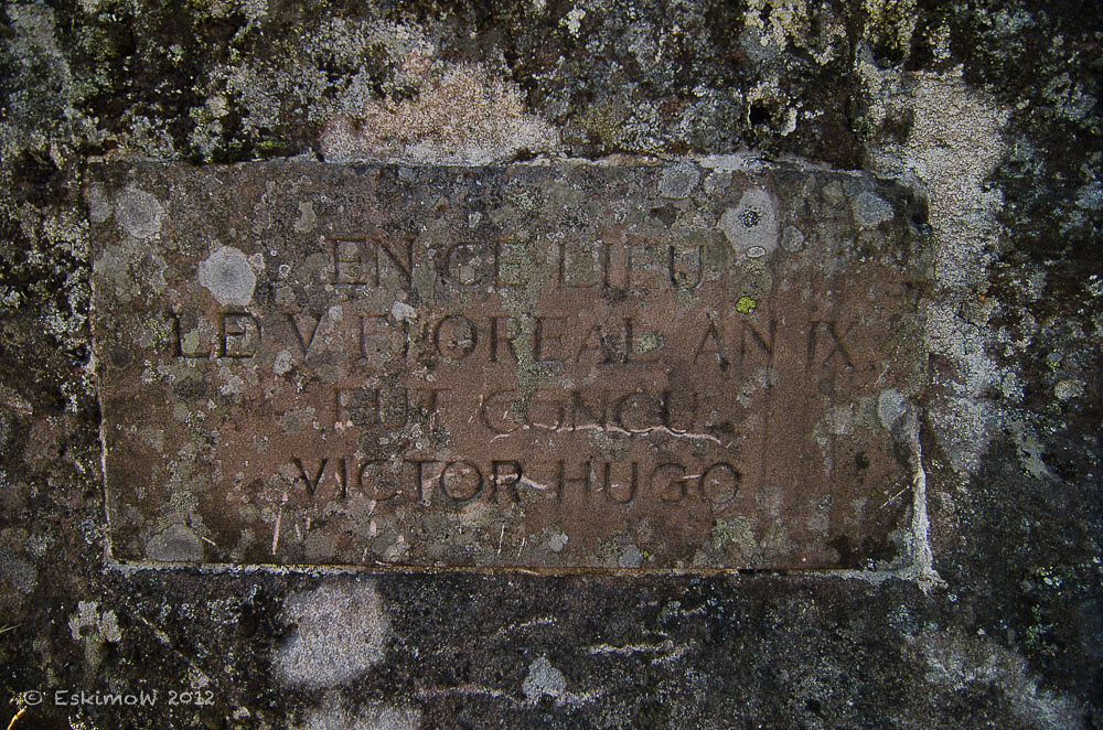 plaque située au mont Donon relatant le lieu de la conception de Victor Hugo par son père Léopold